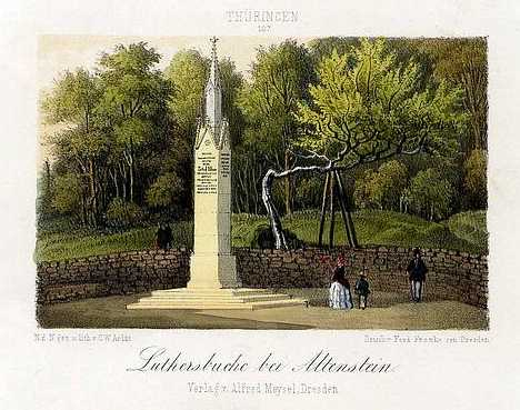 Lutherdenkmal am Ort der Gefangennahme Martin Luthers (4. Juni 1521) nahe Schloss Altenstein bei Bad Liebenstein und oberhalb Steinbachs, von wo er zur Wartburg gebracht wurde.